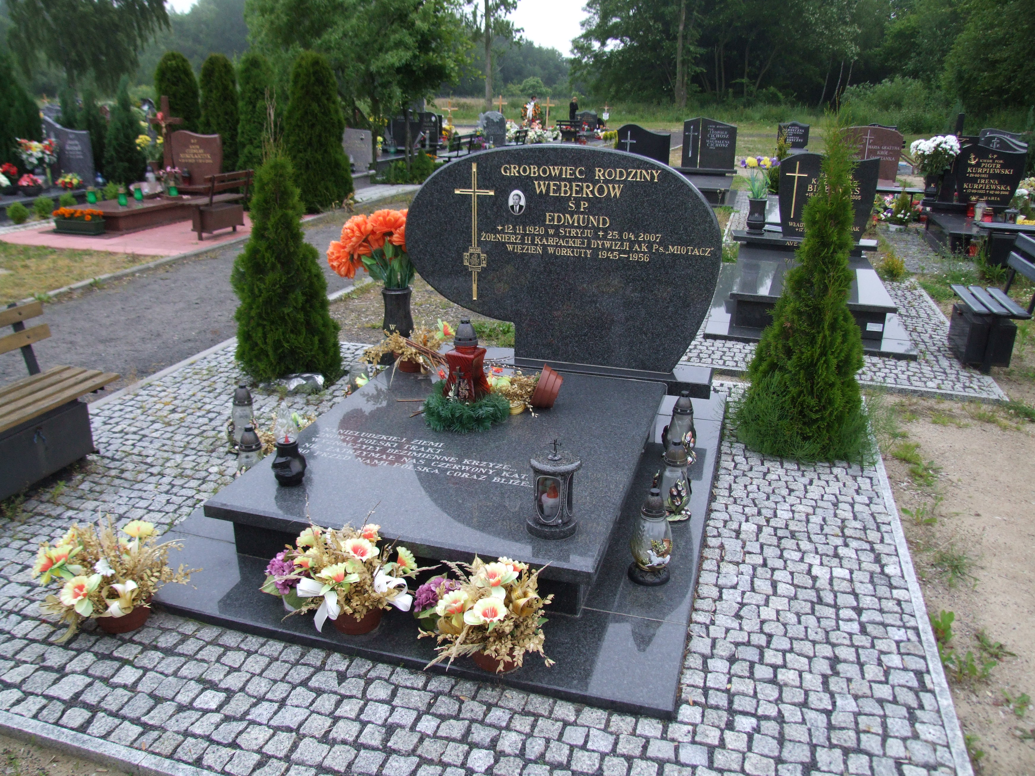 Gdynia-Oksywie Cmentarz Marynarki Wojennej